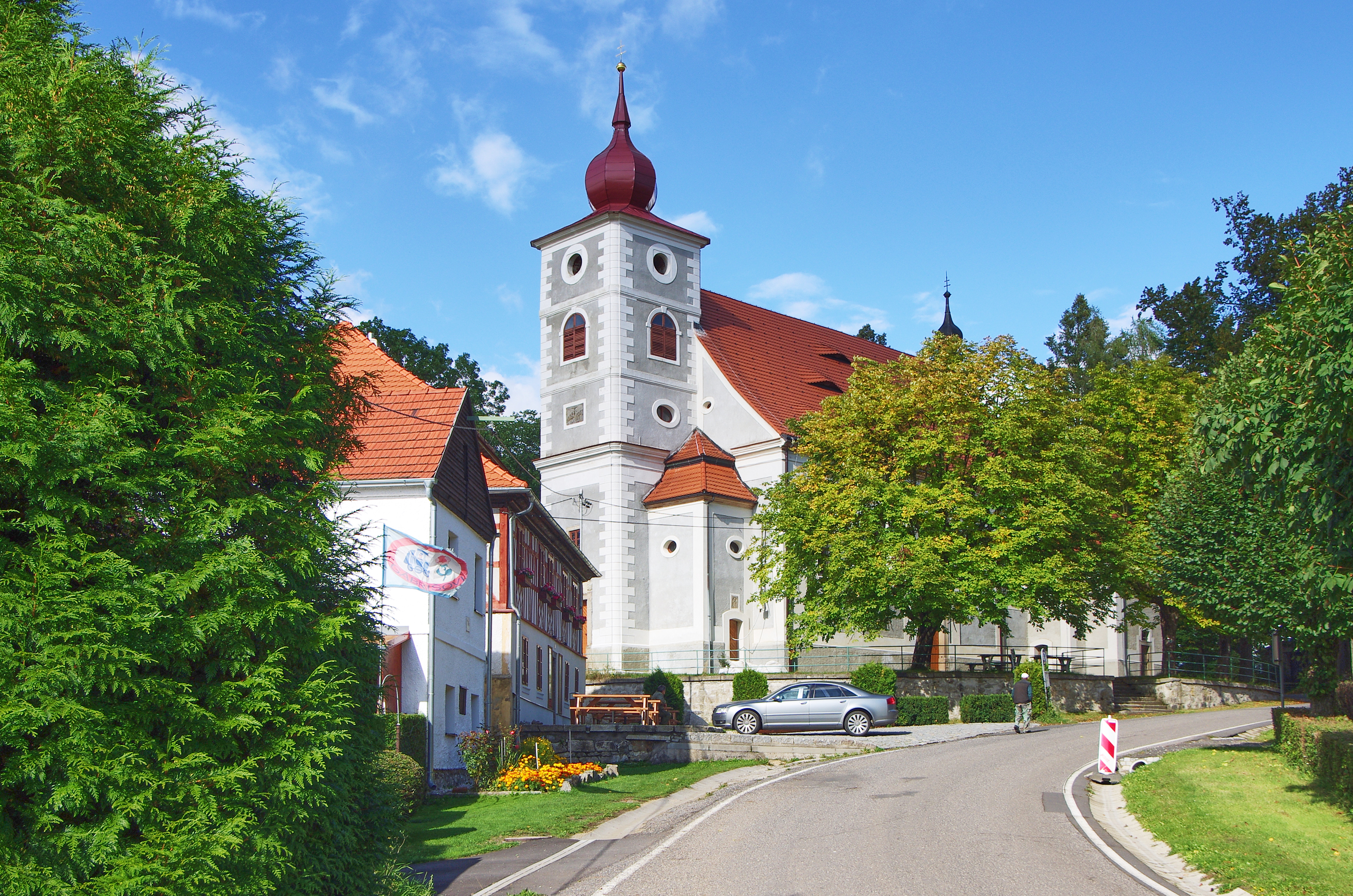 Kostel sv. Petra a Pavla (Kostelní Bříza), uprostřed obce, Kostelní Bříza; více